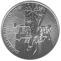 Монета 165 років Астрономічній обсерваторії Київського національного університету реверс